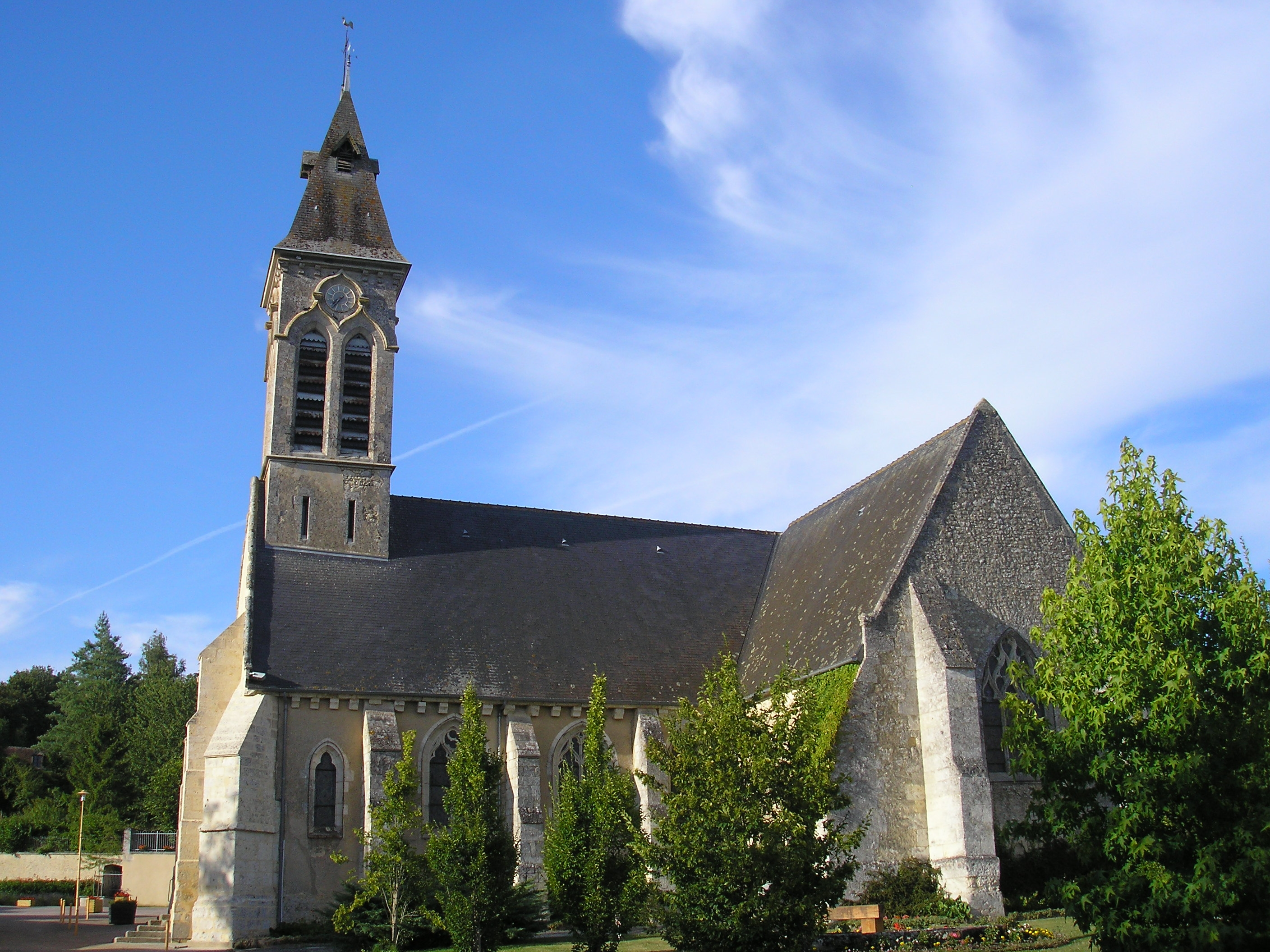 Pervenchères (Normandie, France). L'église Notre-Dame de l'Assomption.